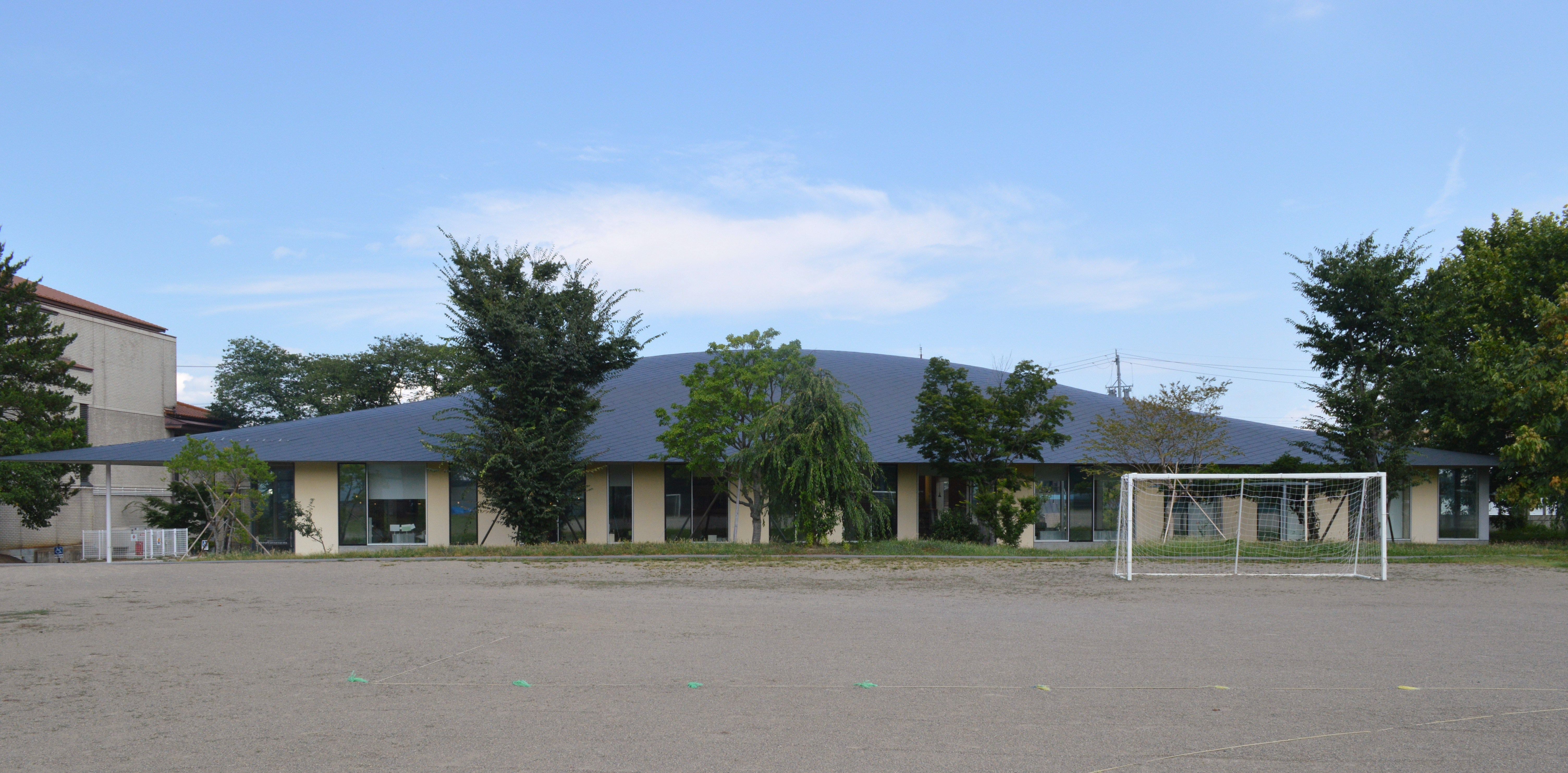 小布施町立図書館まちとしょテラソ。